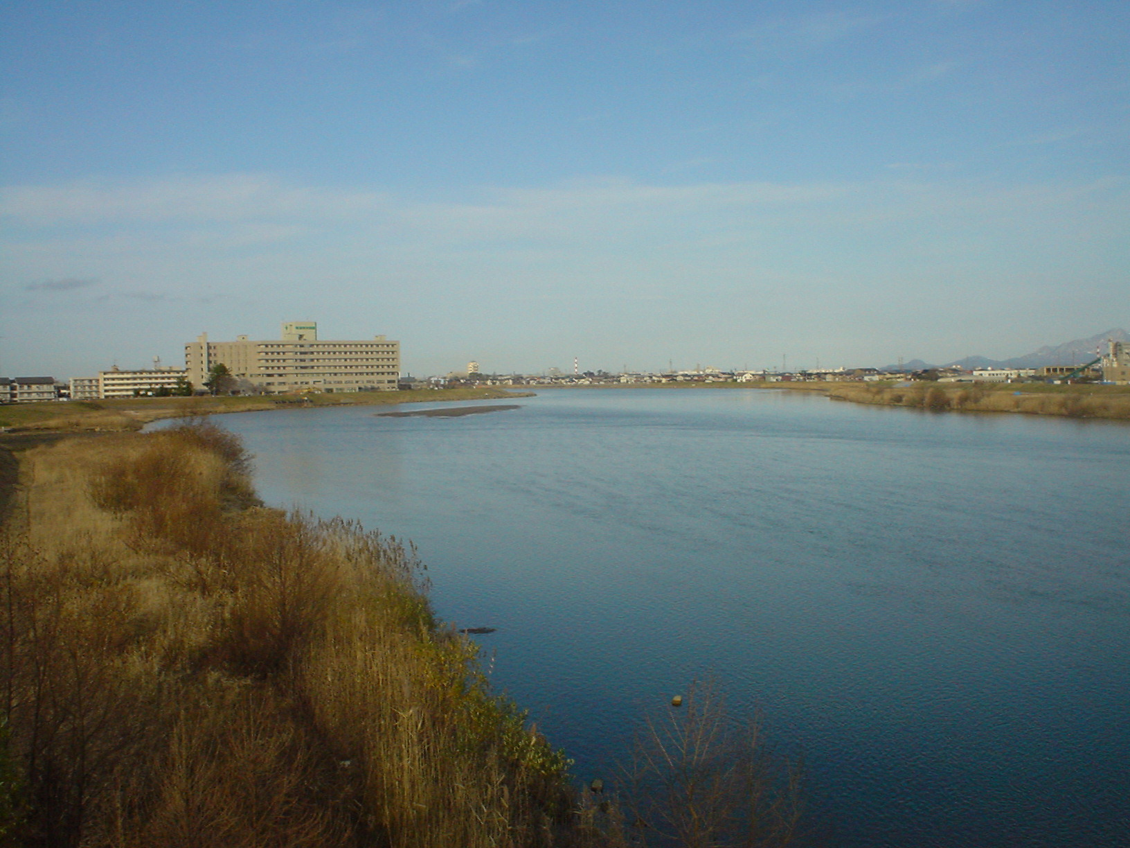 Seki River in Niigata, Japan.ja: 関川（新潟県上越市国道8号関川大橋より河口方向撮影）